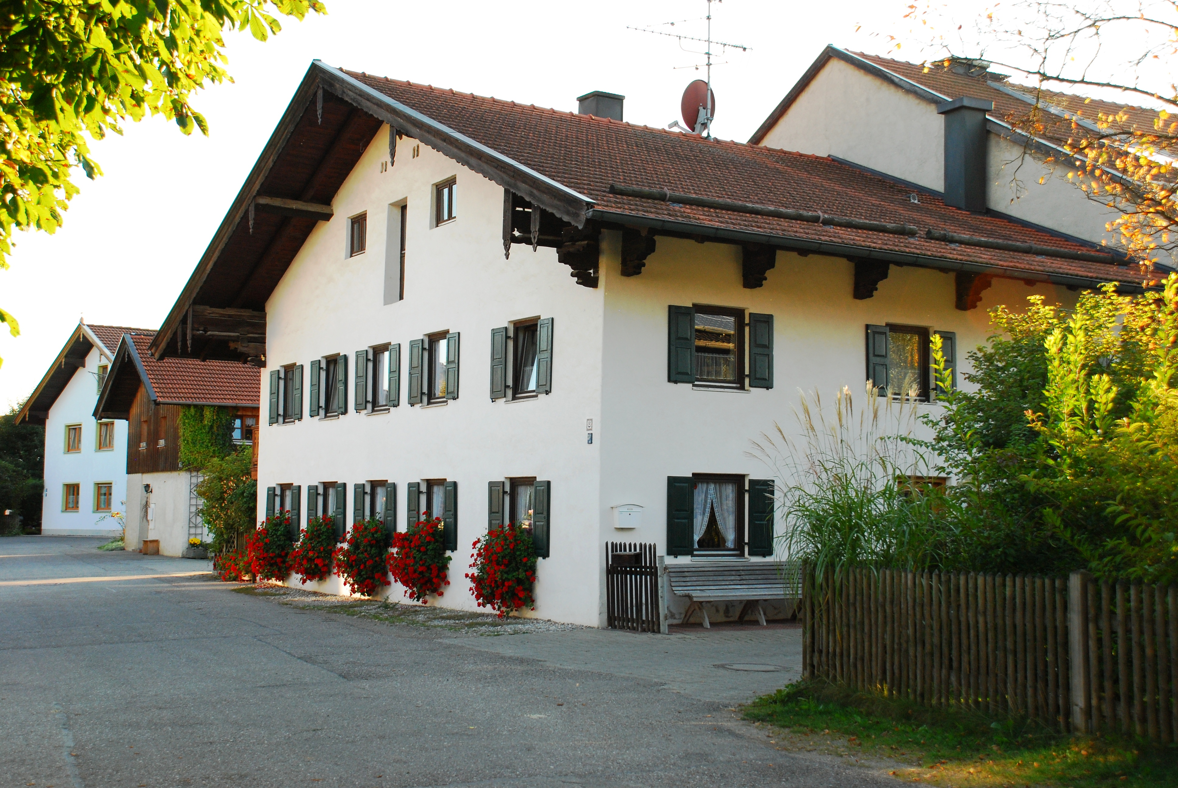 Bauernhaus in der Oberen Dorfstraße 8 in Aying, Landkreis München, Regierungsbezirk Oberbayern, Bayern. Als Baudenkmal in der Bayerischen Denkmalliste aufgeführt. Foto gemäß den Voraussetzungen zur Panoramafreiheit von öffentlicher Verkehrsfläche aus aufgenommen.